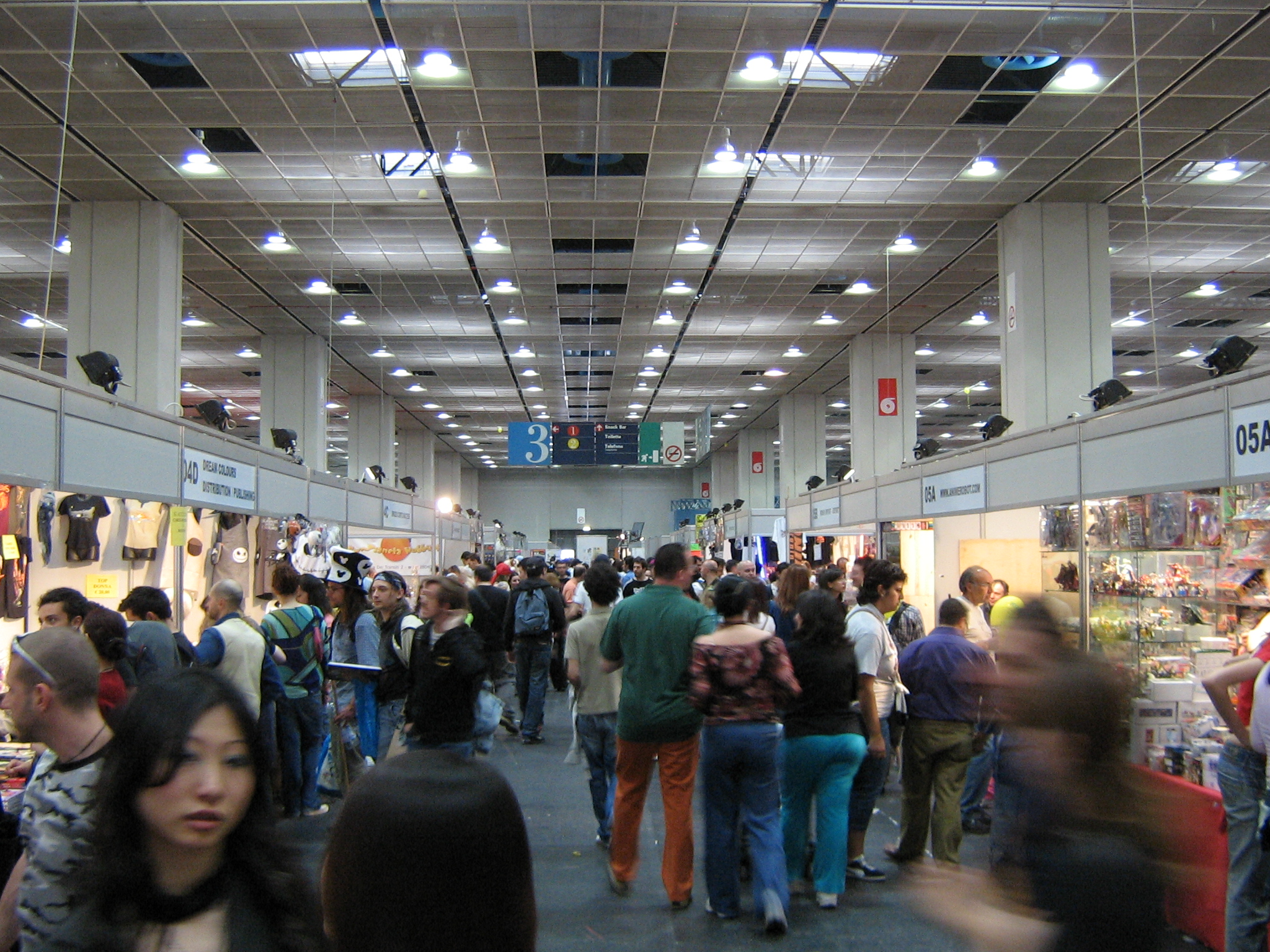 Torino Comics 2006, exhibitors. Torino, Lingotto fiere 3.